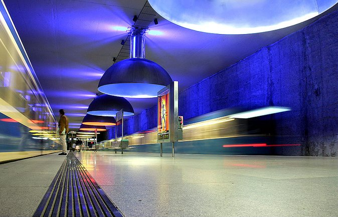 U-Bahn-Station Westfriedof (U1)